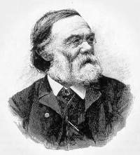 Wilhelm von Gümbel (1823–1898), German geologist